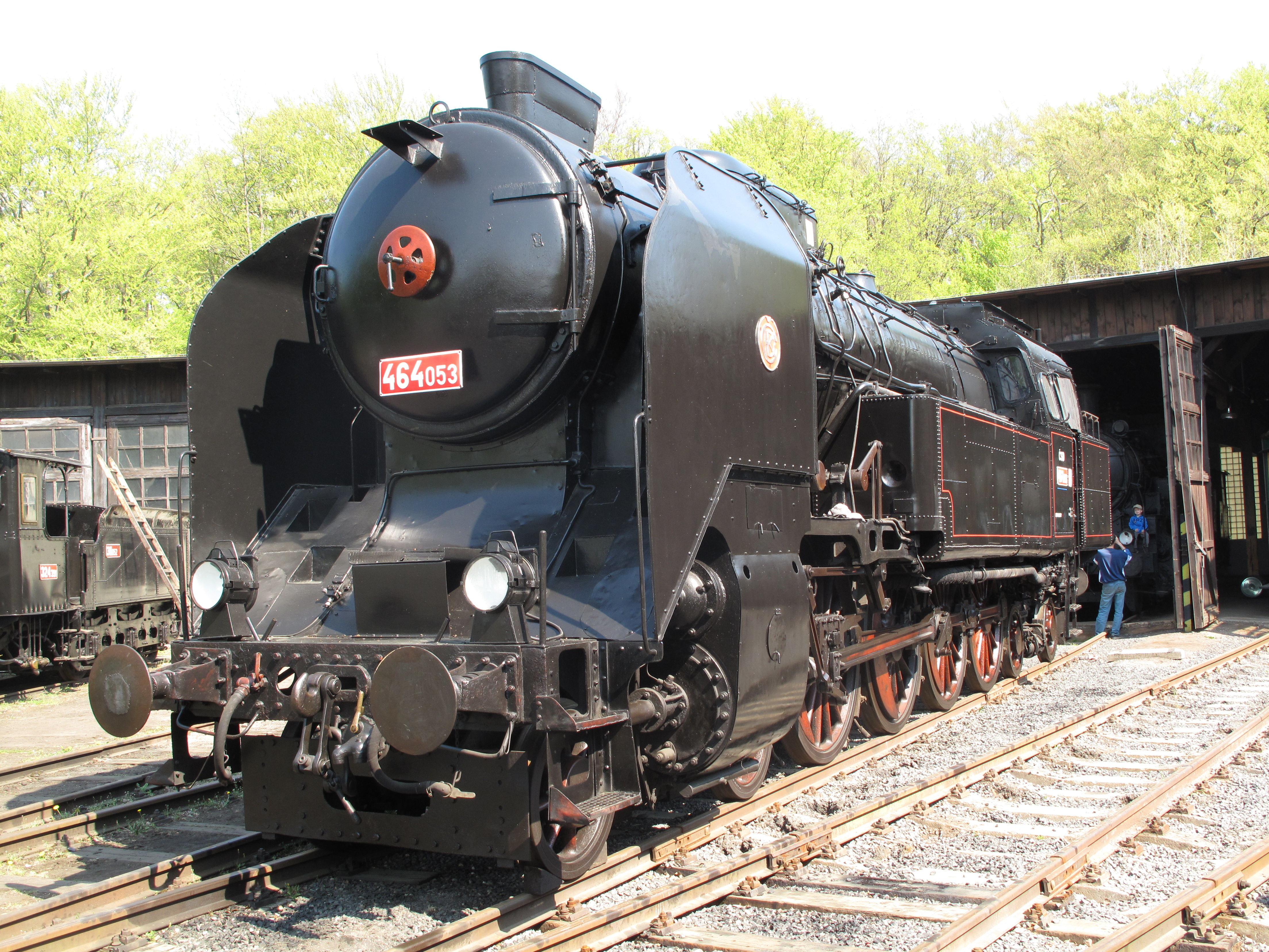 Železniční muzeum Lužná u Rakovníka